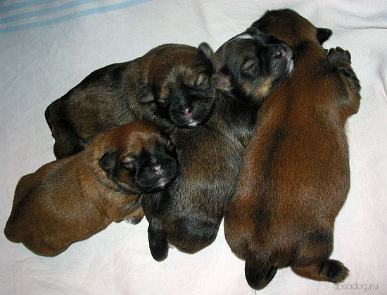 Puppys Lhasa Apso